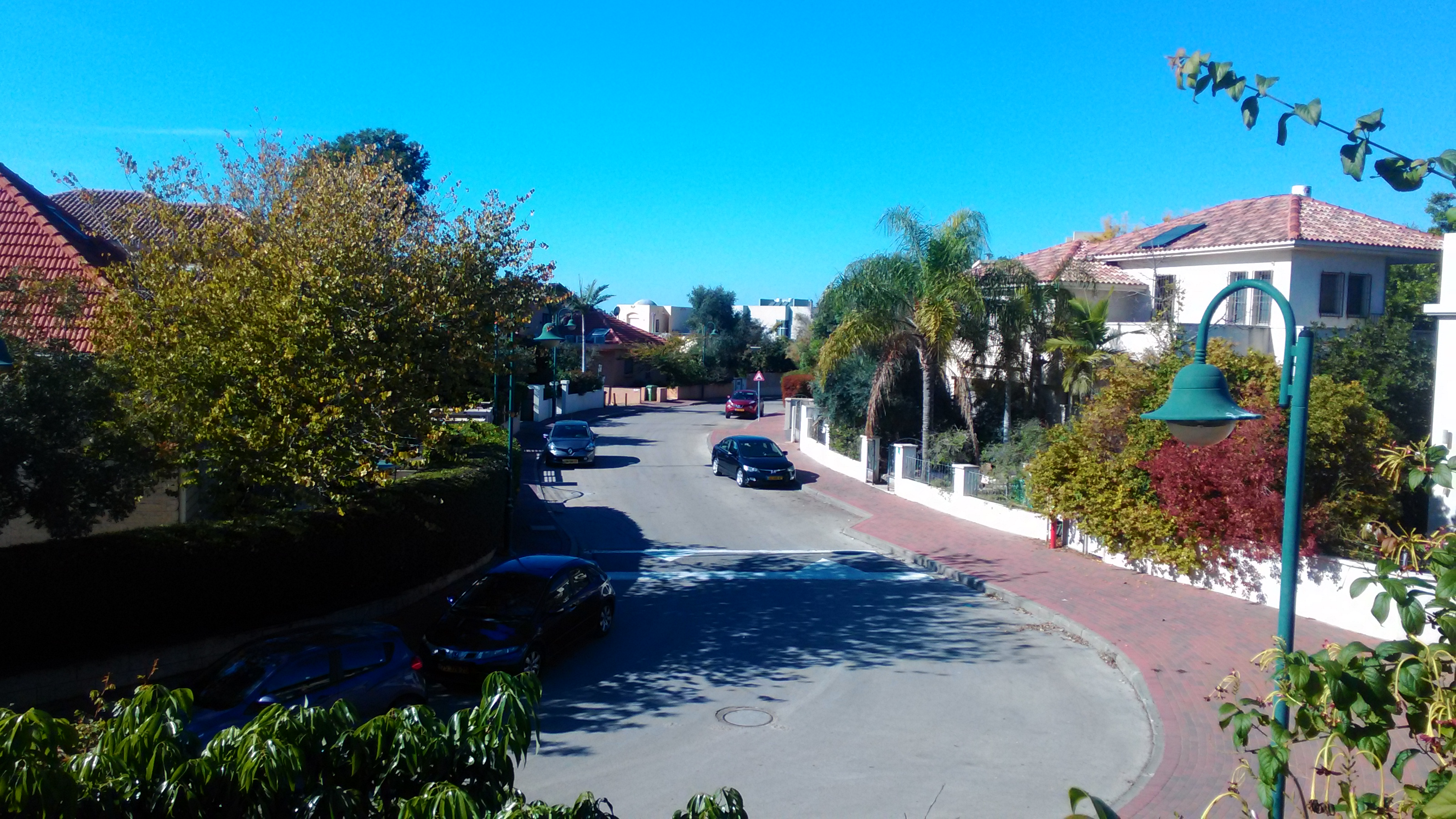 בצרה, רחוב בשכונת ההרחבה